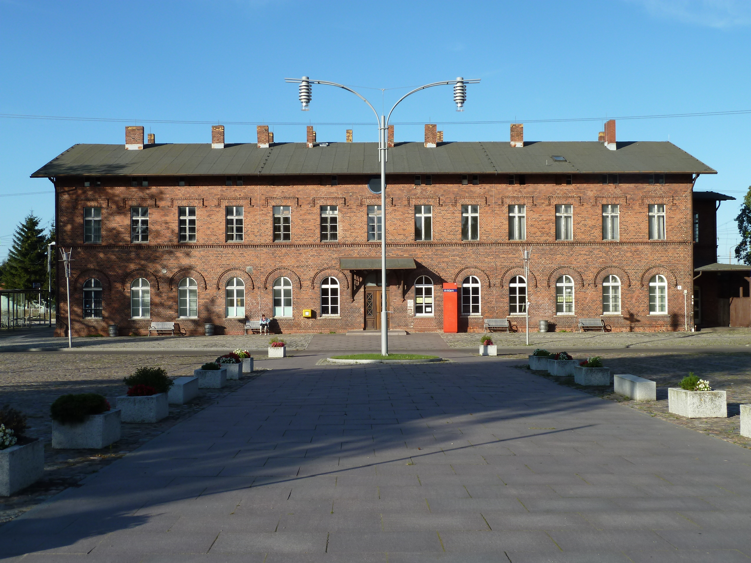 Bahnhof Anklam, denkmalgeschütztes Empfangsgebäude